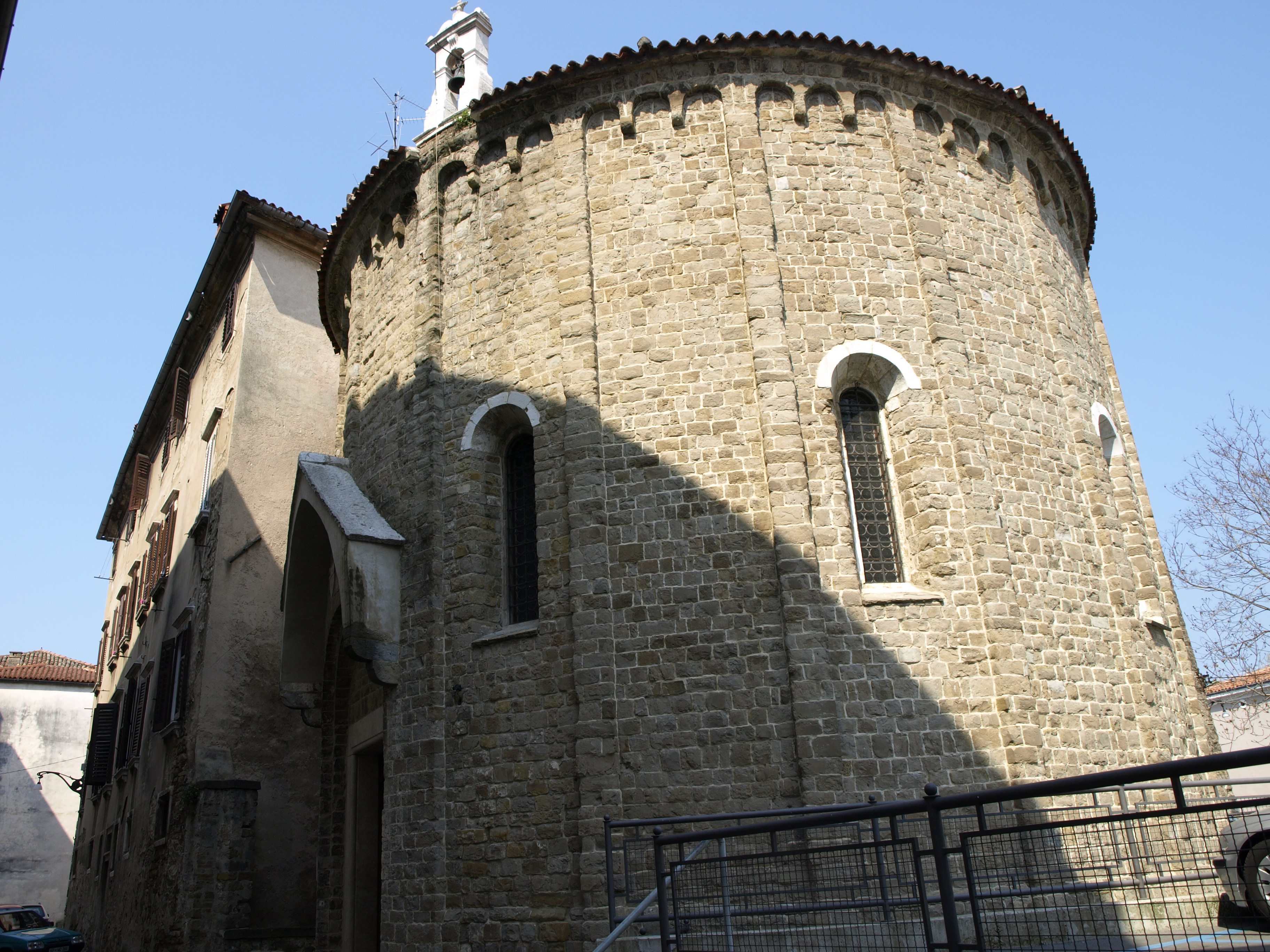 Capodistria